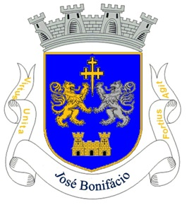 Escudo de Armas do Distrito de José Bonifácio, São Paulo, Brasil